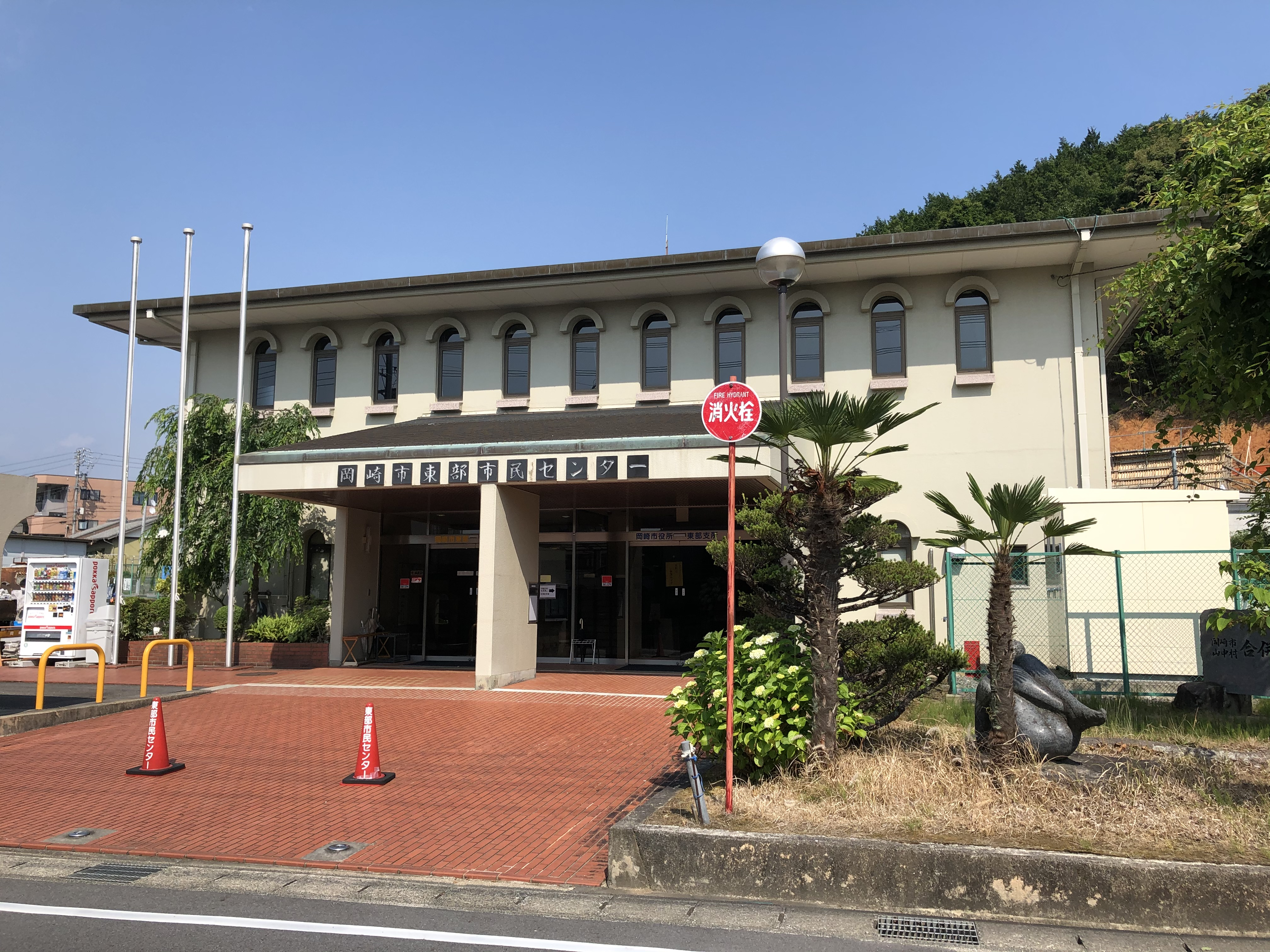 岡崎市東部市民センター（岡崎市山綱町）